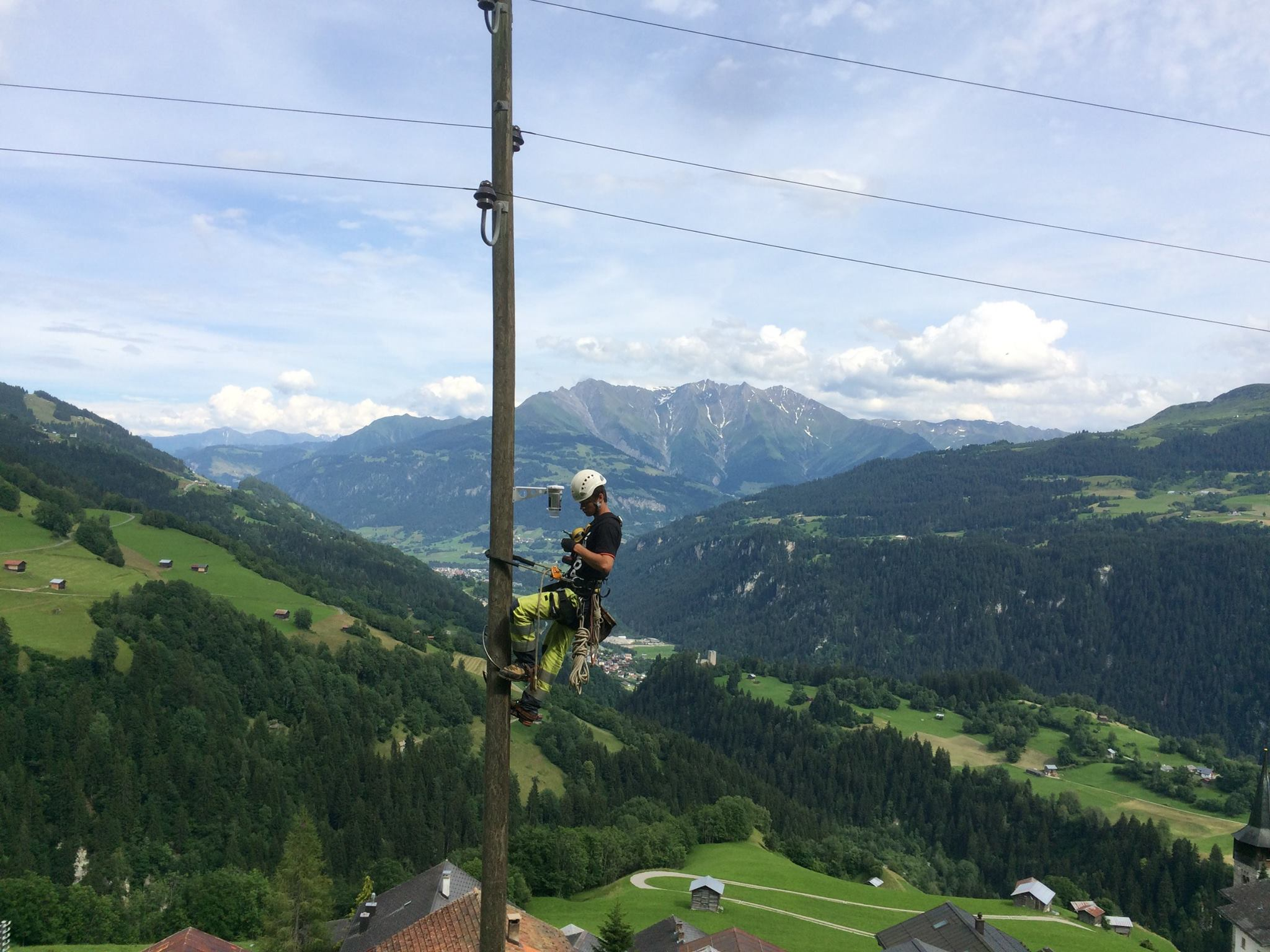 Установка УПУ на опору линии электропередачи